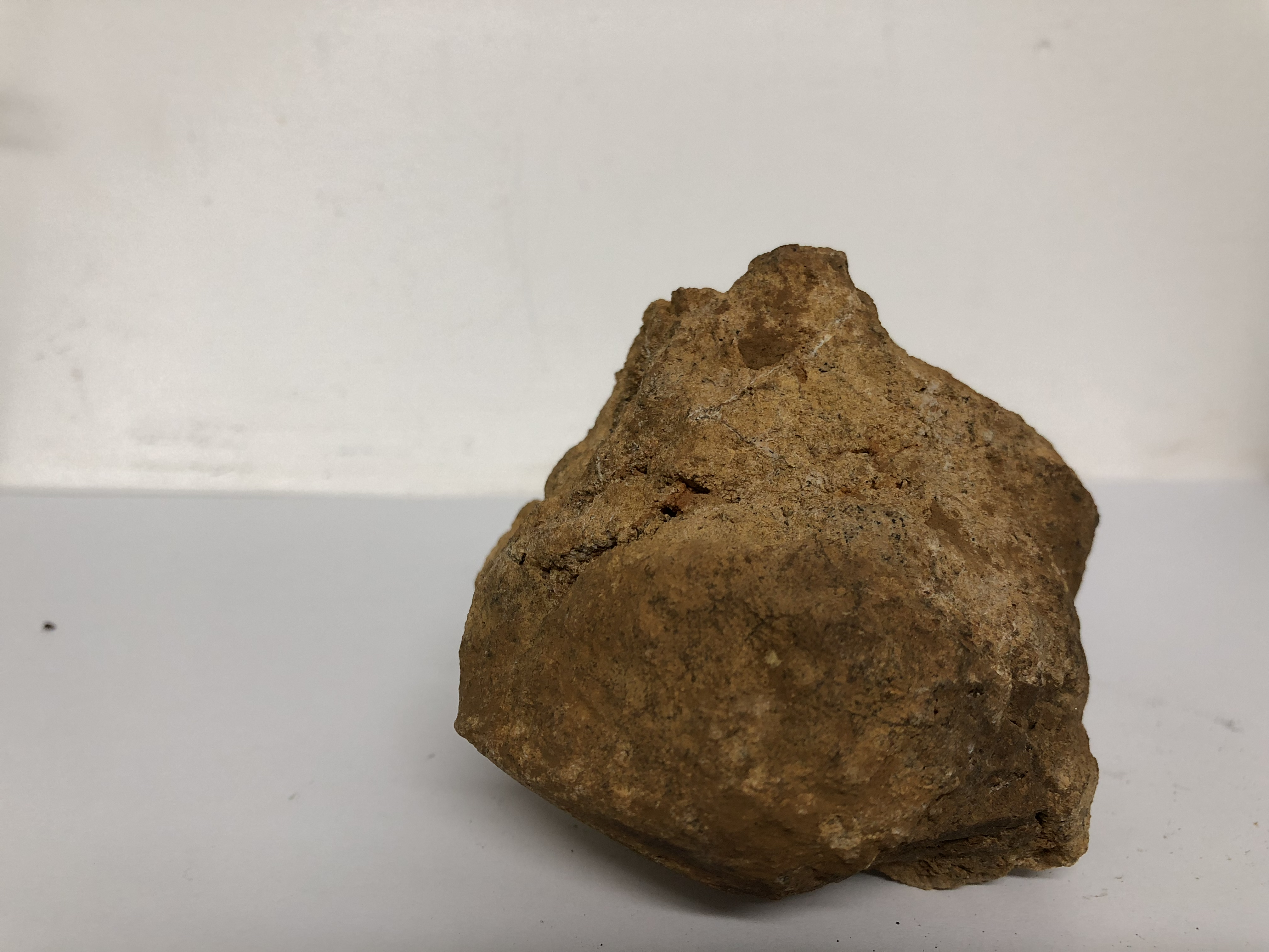 Amostra de arenito